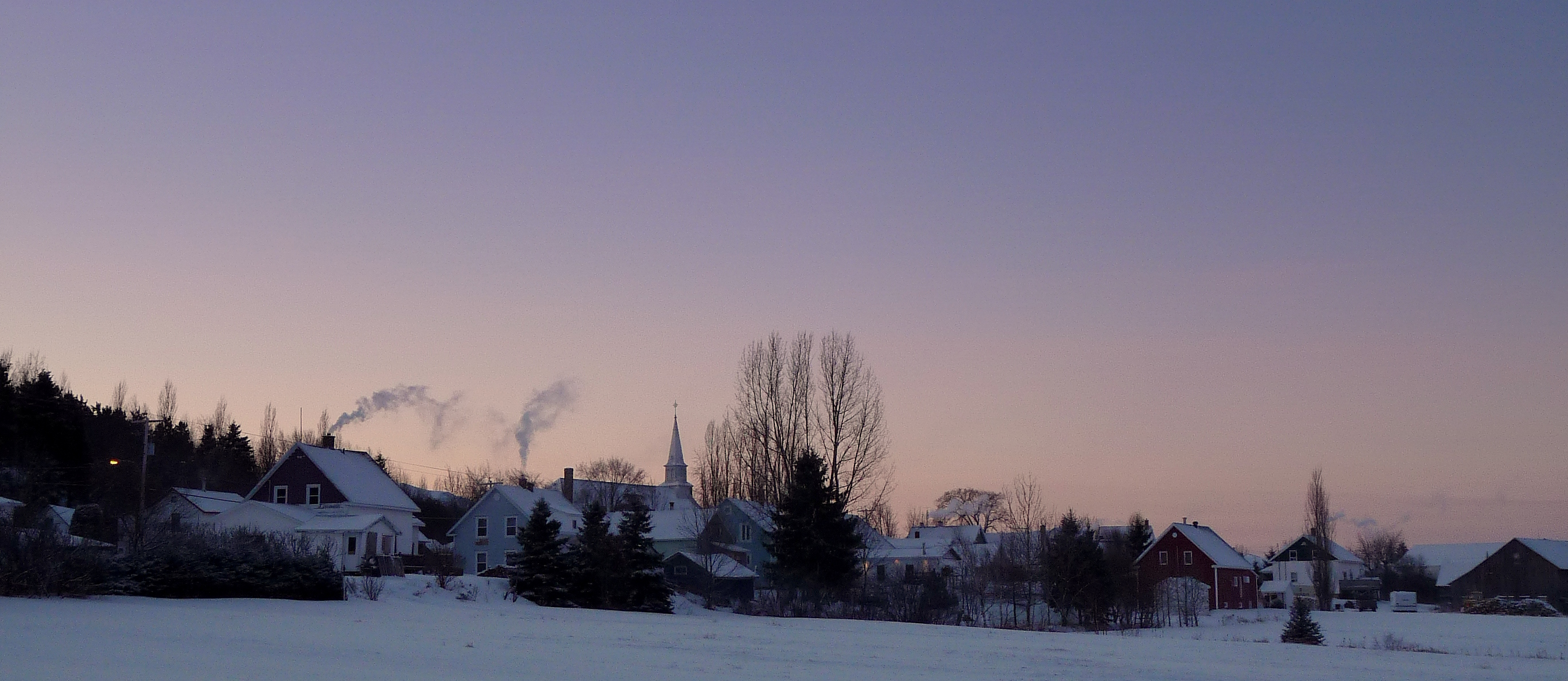 Village de Saint-Épiphane au Bas-Saint-Laurent (Québec)